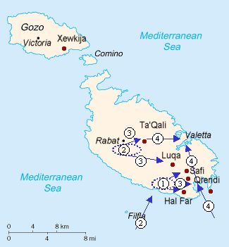 Carte de l'opération Herkules